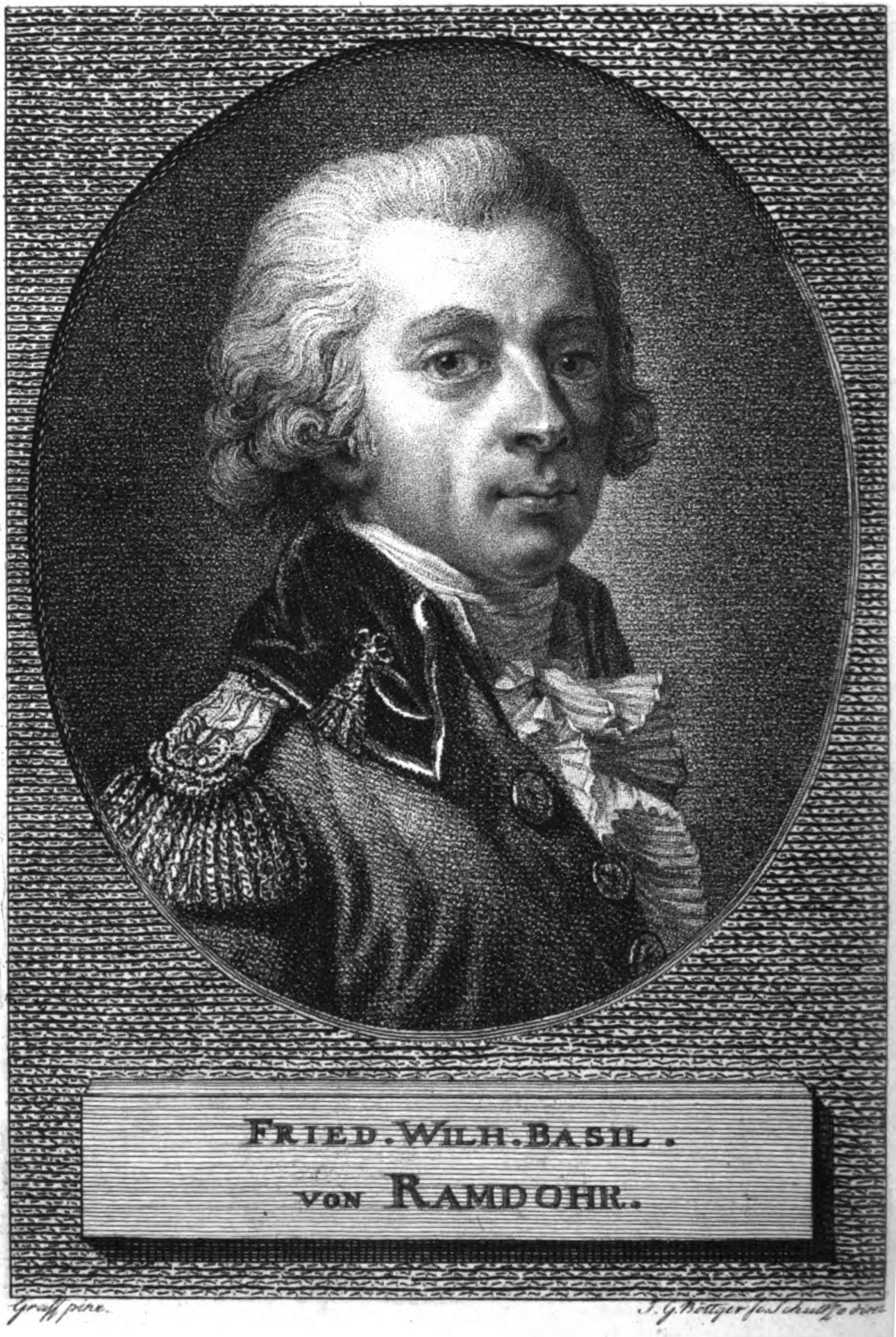 Porträt des Diplomaten Basilius von Ramdohr (1757-1822)